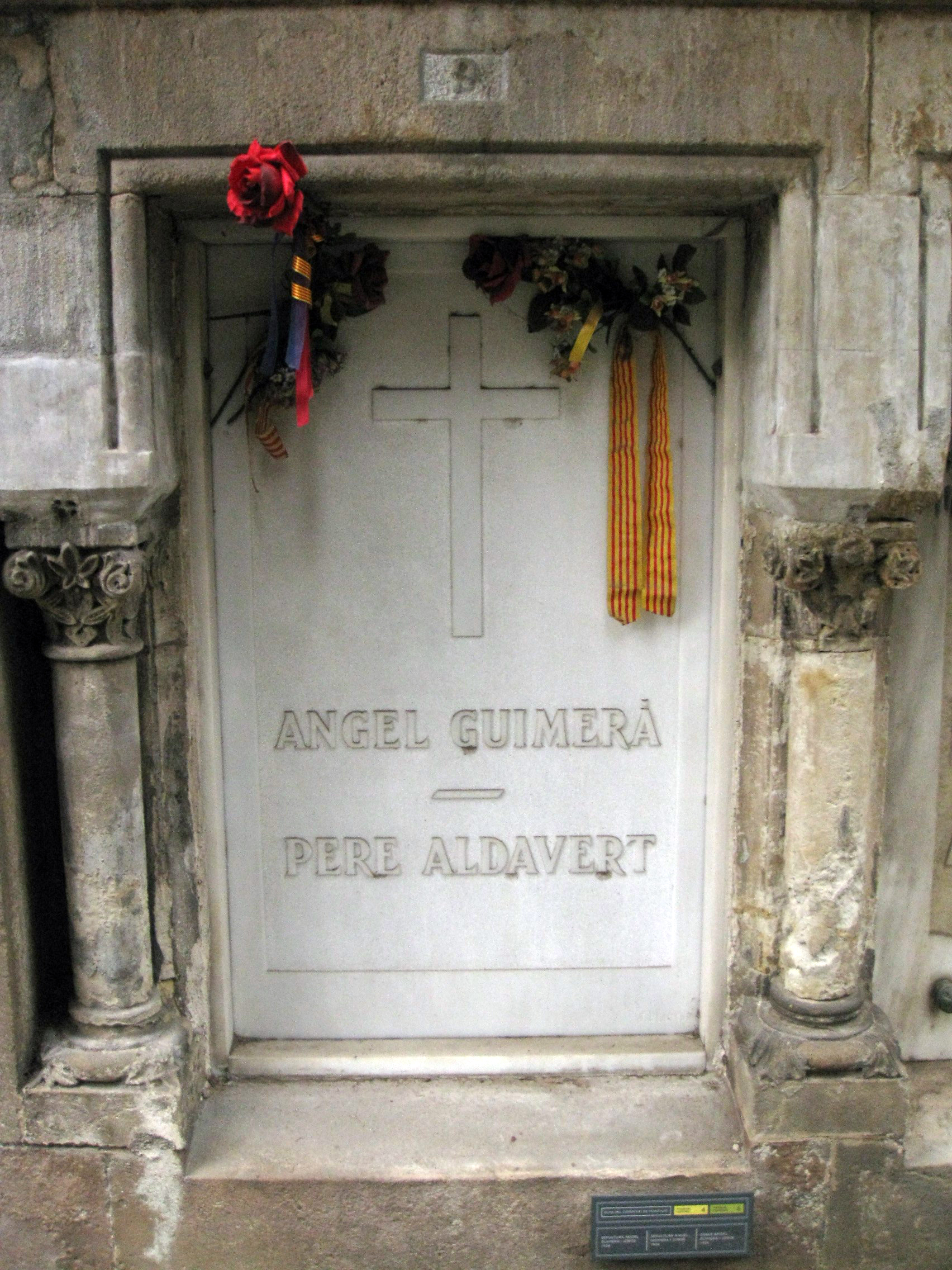 Cementiri de Montjuïc (Barcelona) Object location41° 21′ 10.96″ N, 2° 09′ 08.74″ E